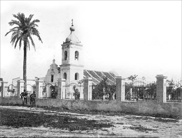 Foto de la vieja Capilla de Guadalupe.